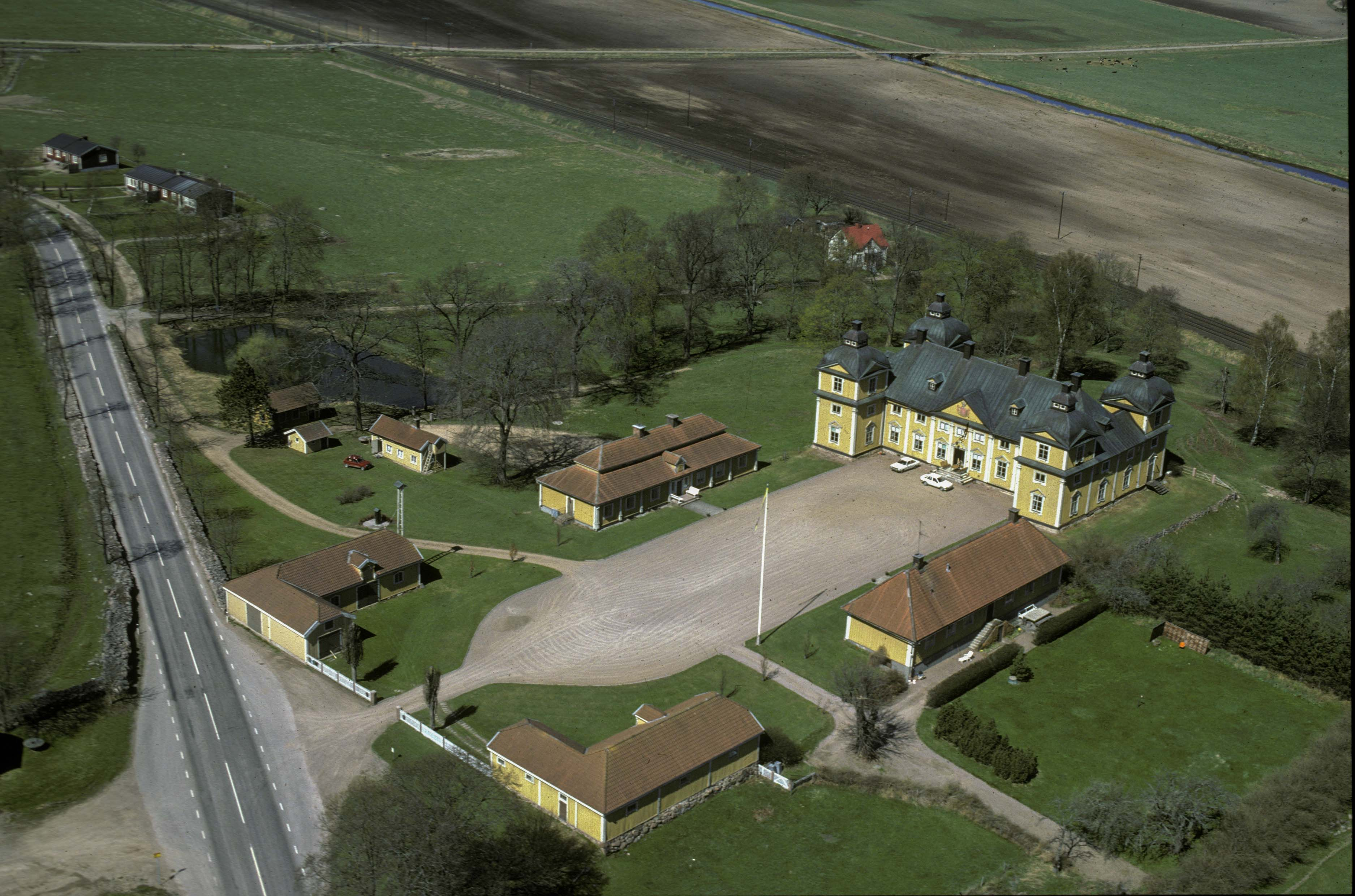 Gripenbergs slott från luften. Länsväg 133 framför slottet i bildens vänstra del.